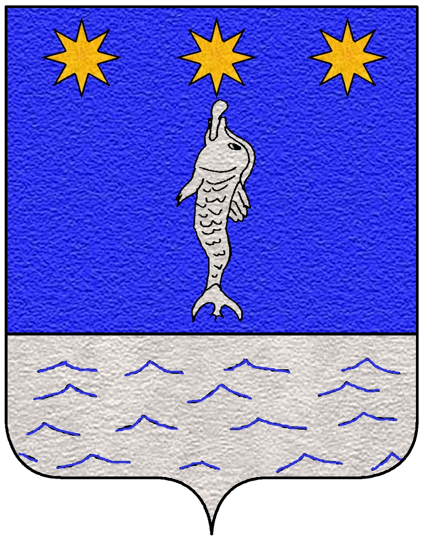 Stemma della famiglia Zucchini